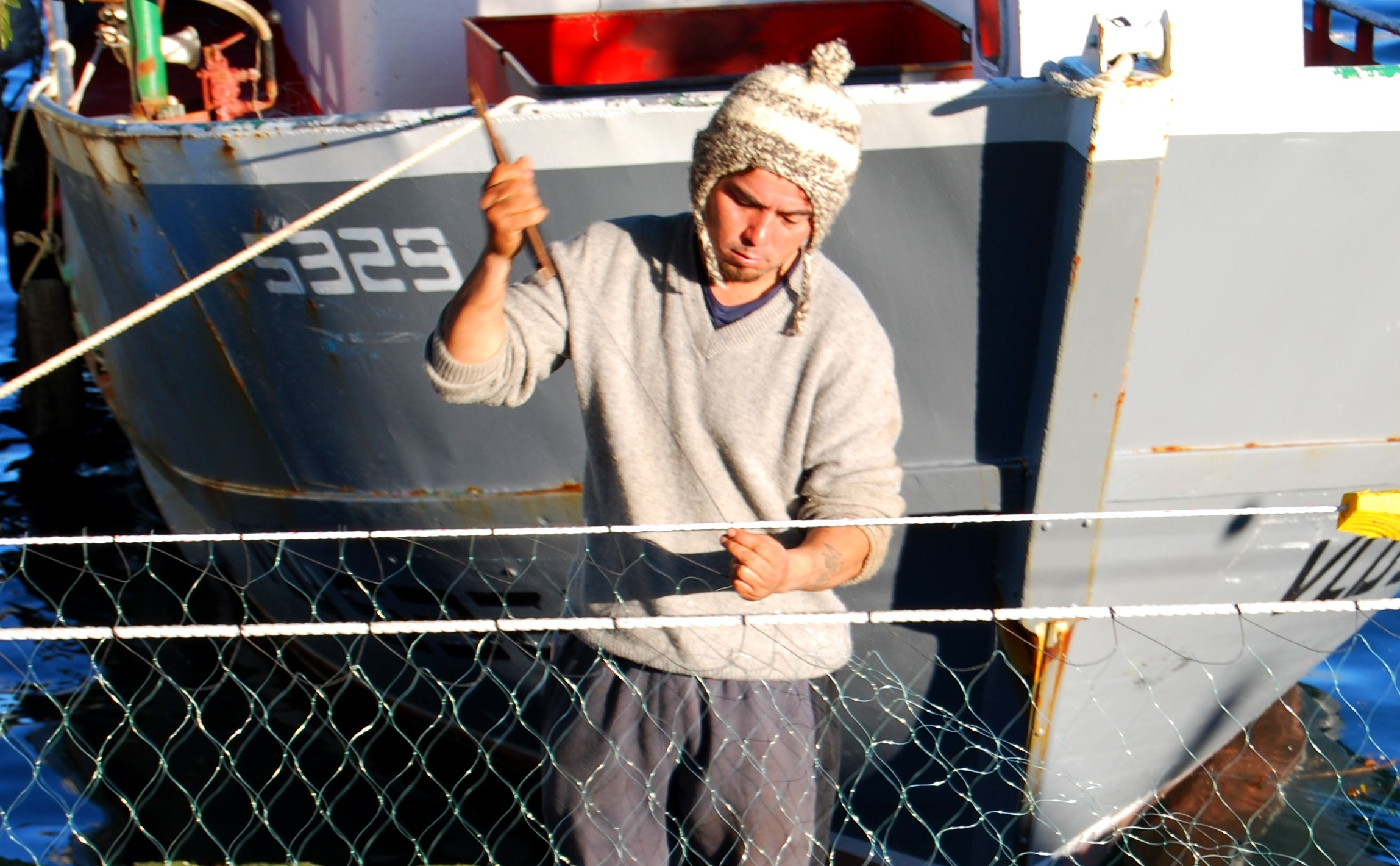 Pescador arreglando su red, en Dalcahue, Chiloé.